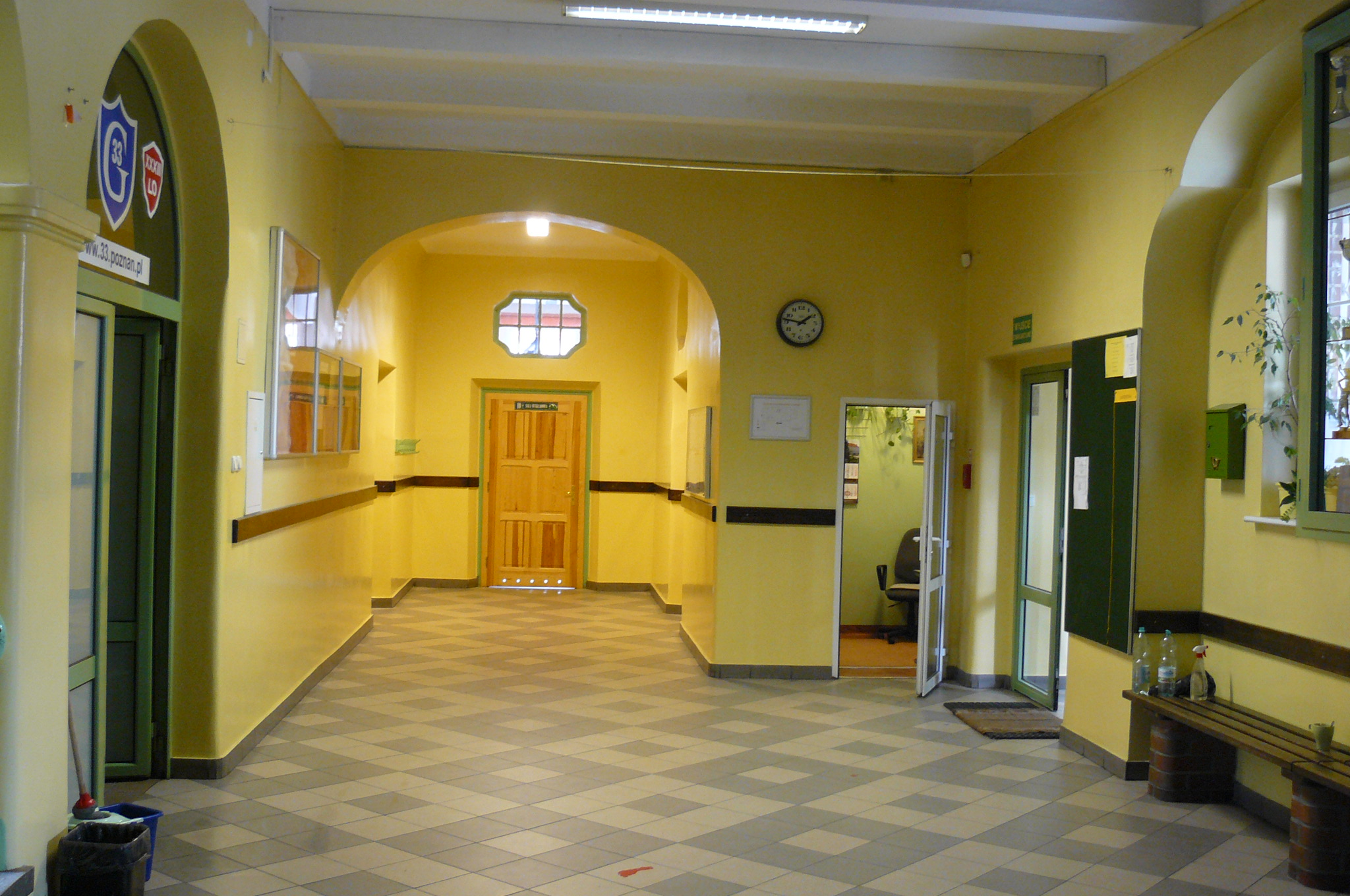 Poznań Łazarz - zespół zabudowań szkolnych (zabytek nr A 258).